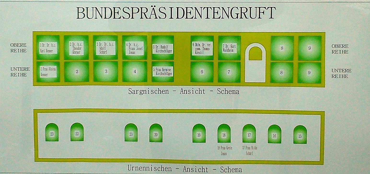 Zentralfriedhof Wien, Plan der Bundespräsidentengruft